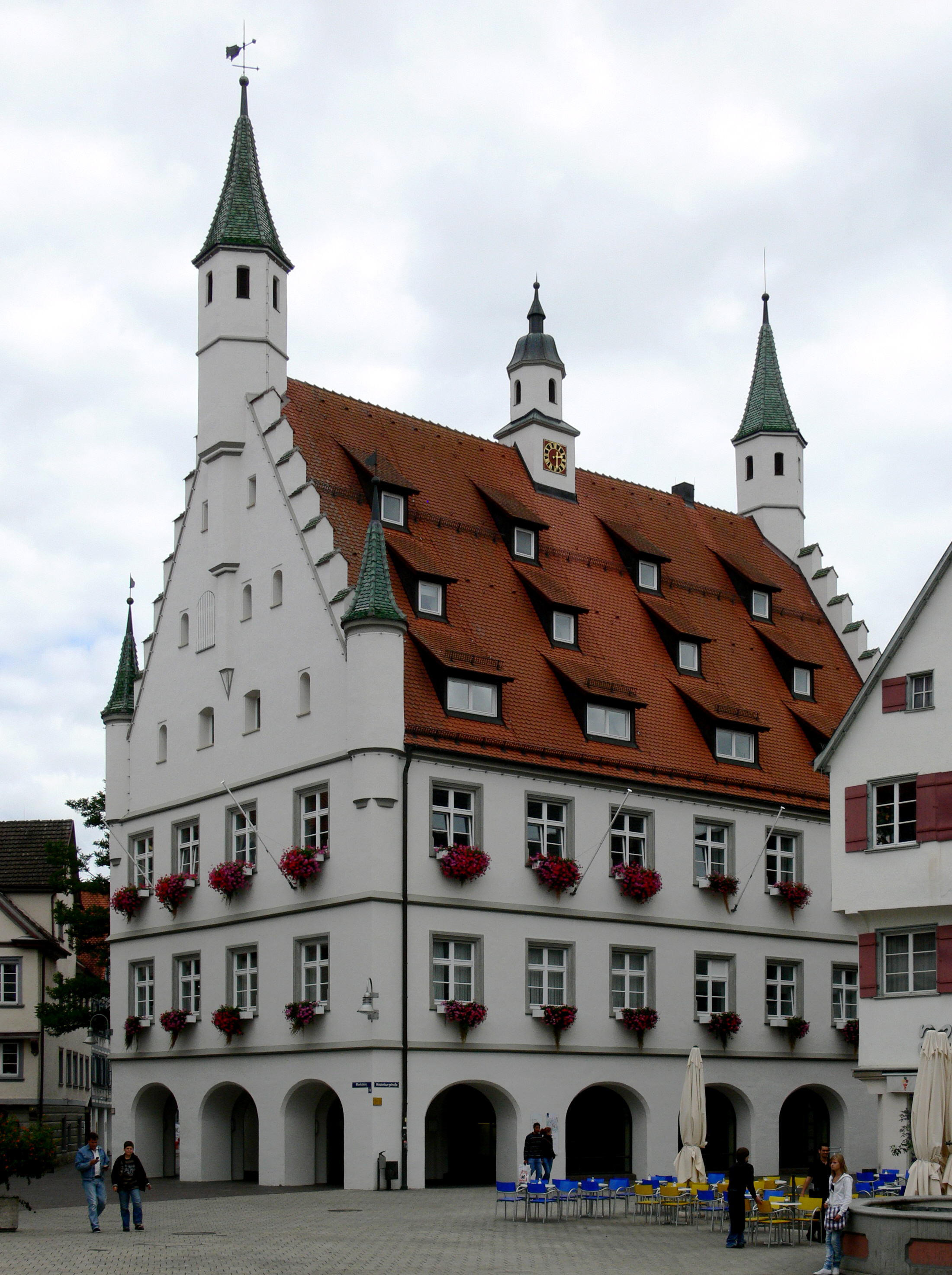 Biberach an der Riß Neues Rathaus